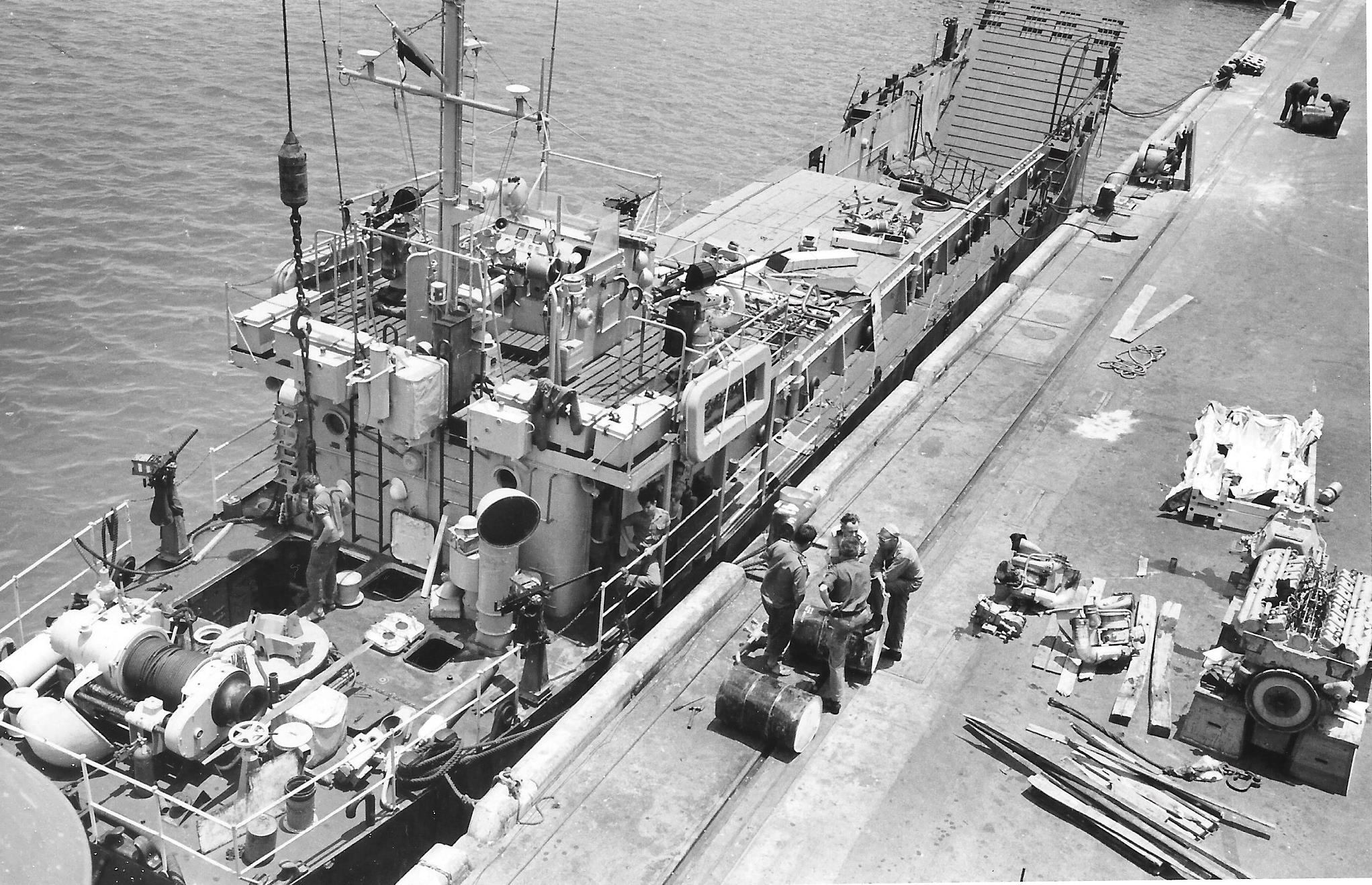 נחתת 36 מטר ברציף הצבאי בחיפה בתקופת ההמתנה למלחמת ששת הימים